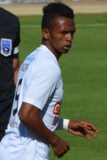 Andria Carolus lors d'un match amical opposant le Stade rennais à l'USM Alger au stade Paul-Audrin de Dinard, le 16 juillet 2016.